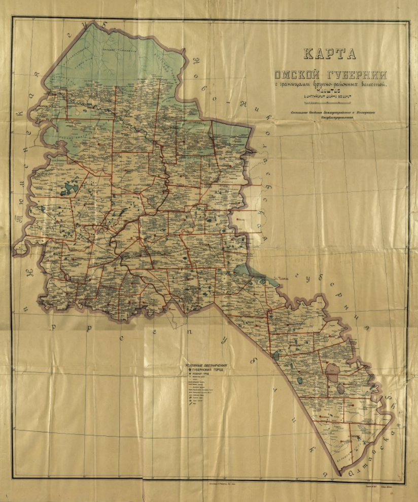 Карта Омской губернии с границами крупно-районных волостей. Масштаб в английском дюйме 20 вёрст. Составлена отделом землеустройства и мелиорации Омгубземуправления. Литография военно-типографского управления. Омск. 1926